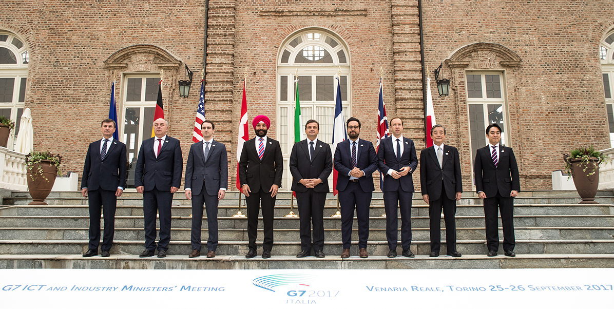 Foto dei partecipanti al G7 Industria di Torino del 2017